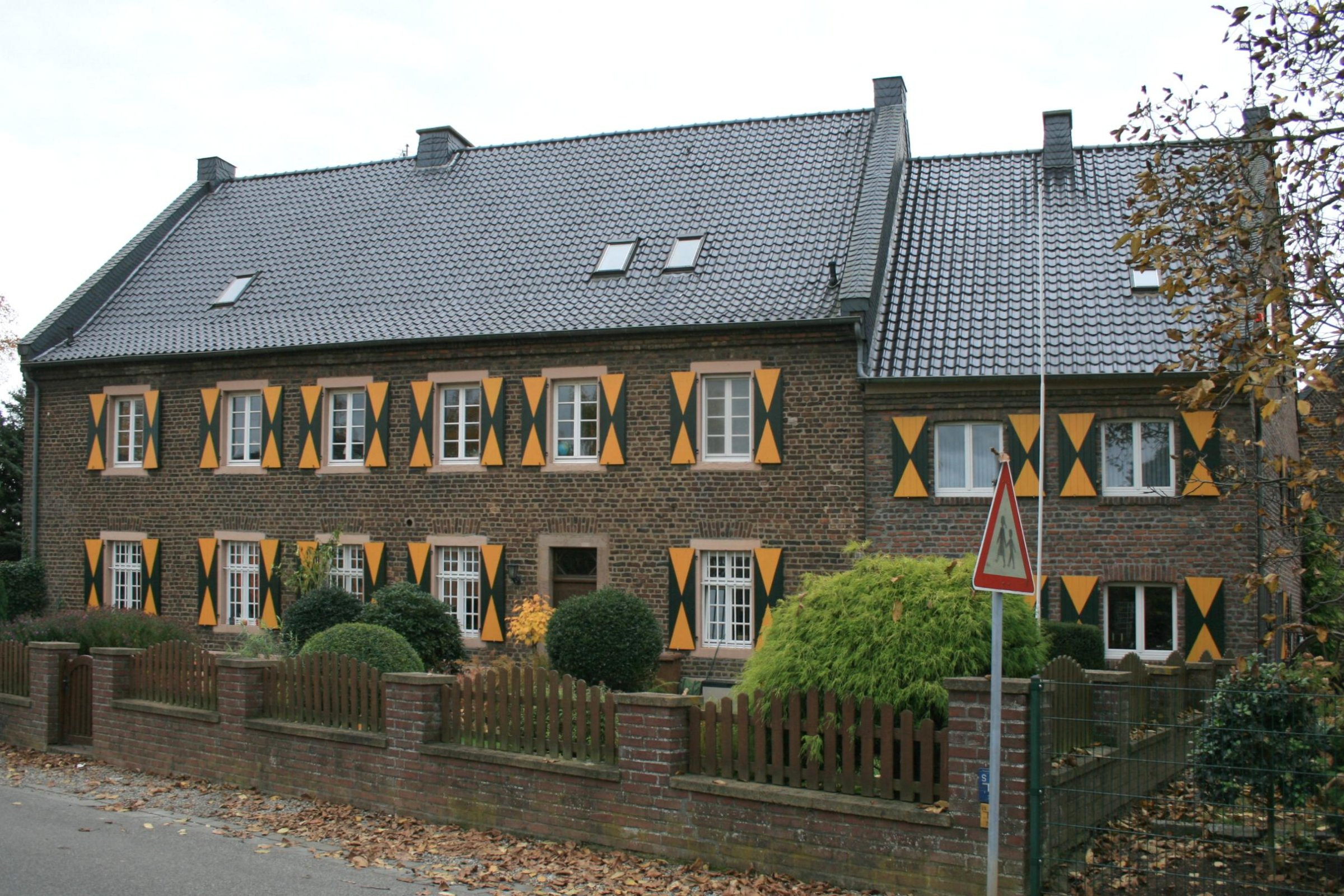 Der ehem. Fronhof, Frongasse 3, in Nörvenich-Wissersheim